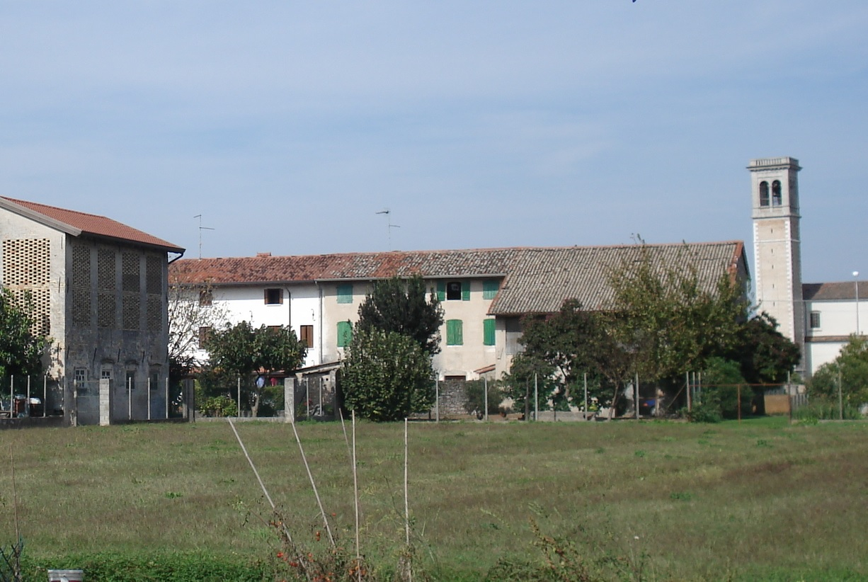 Veduta del campanile di Ronchis, dai campi